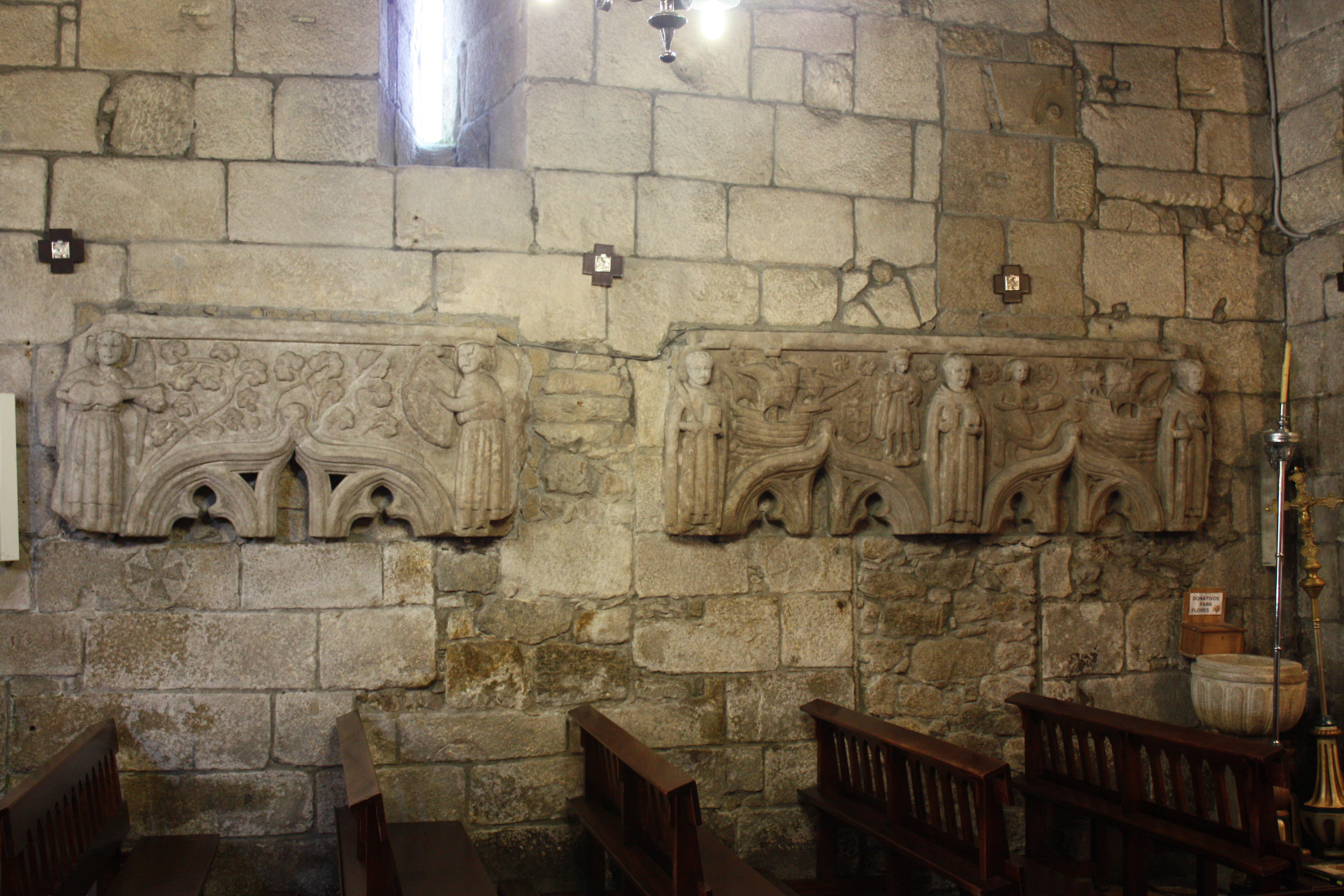 Baldaquino da igrexa de Santa María de Caldas de Reis (Pontevedra)